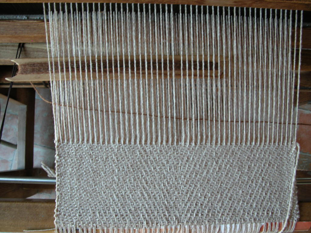 foto mia personale, navetta mette il filo di trama, 2007 Licensing Categoria:Immagini sulla tessitura